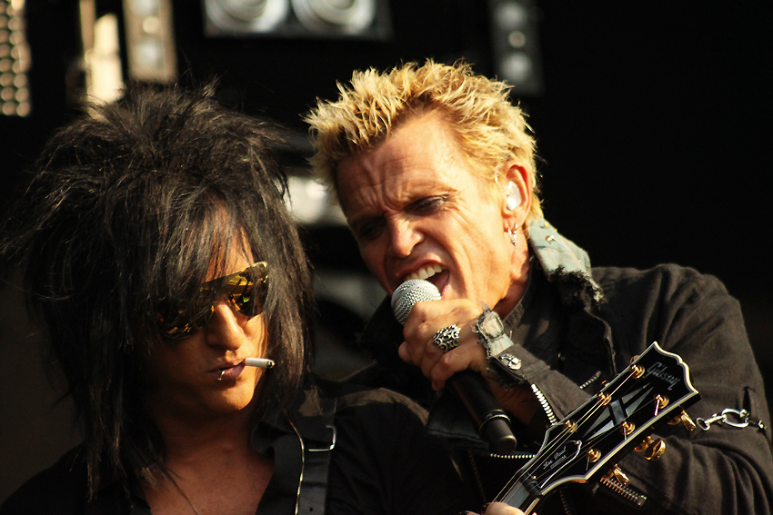 Steve Stevens & Billy Idol at Bospop festival, Weert, the Netherlands, 2010-07-11